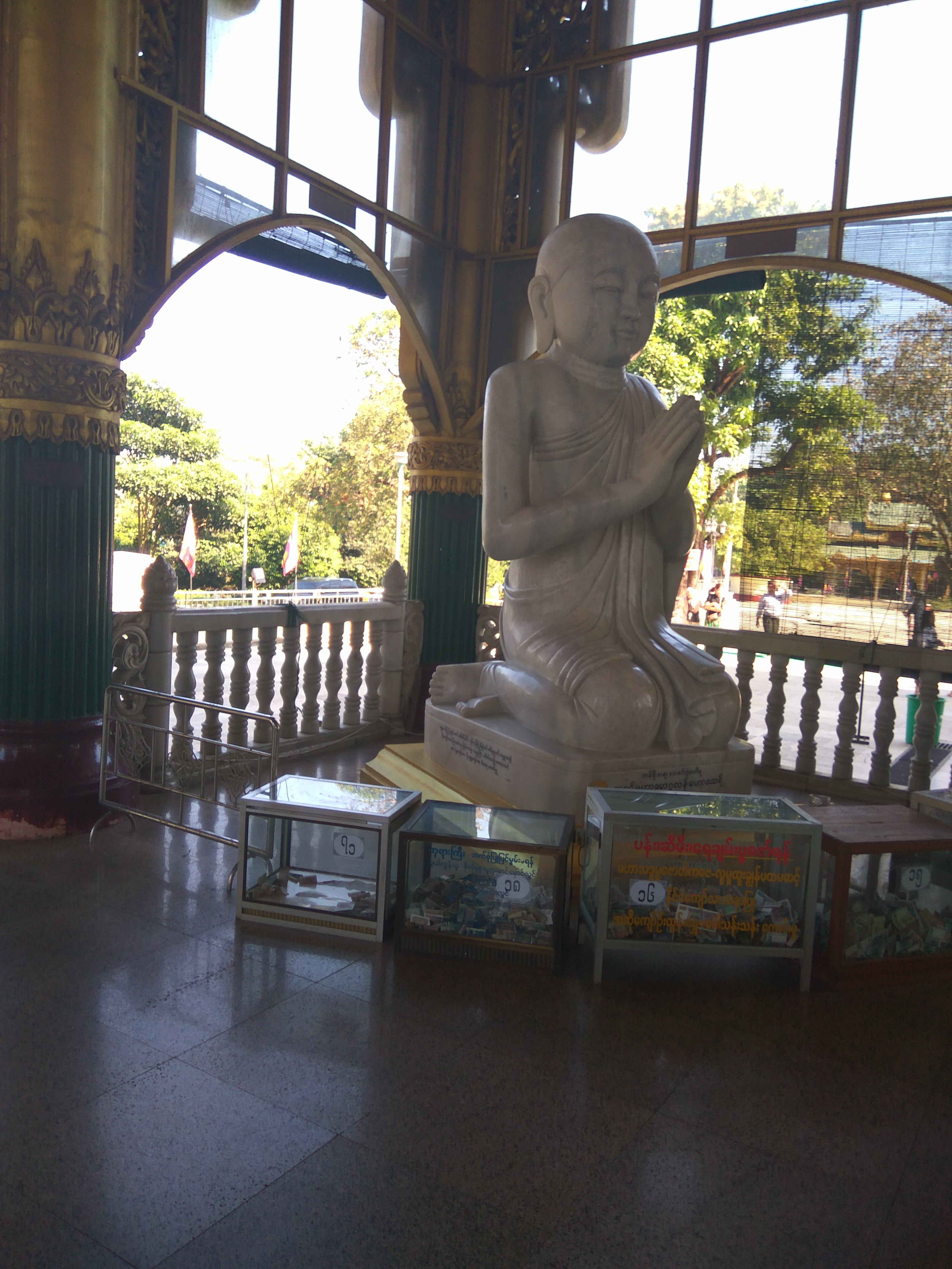 မြန်မာဘာသာ: ရှင်မောဂ္ဂလာန်ထေရ်၏ ရုပ်တု